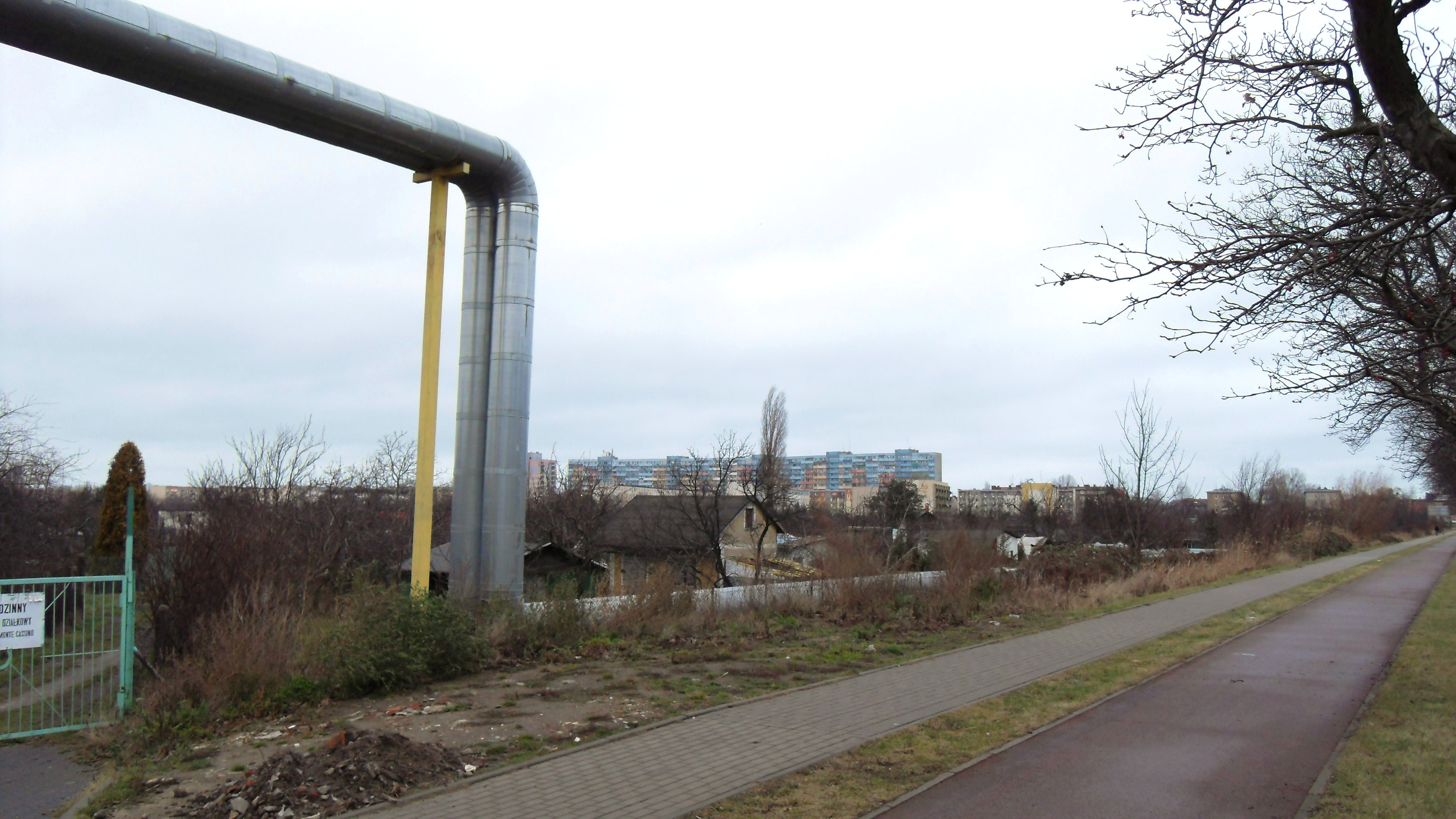 Gdańsk Letnica.